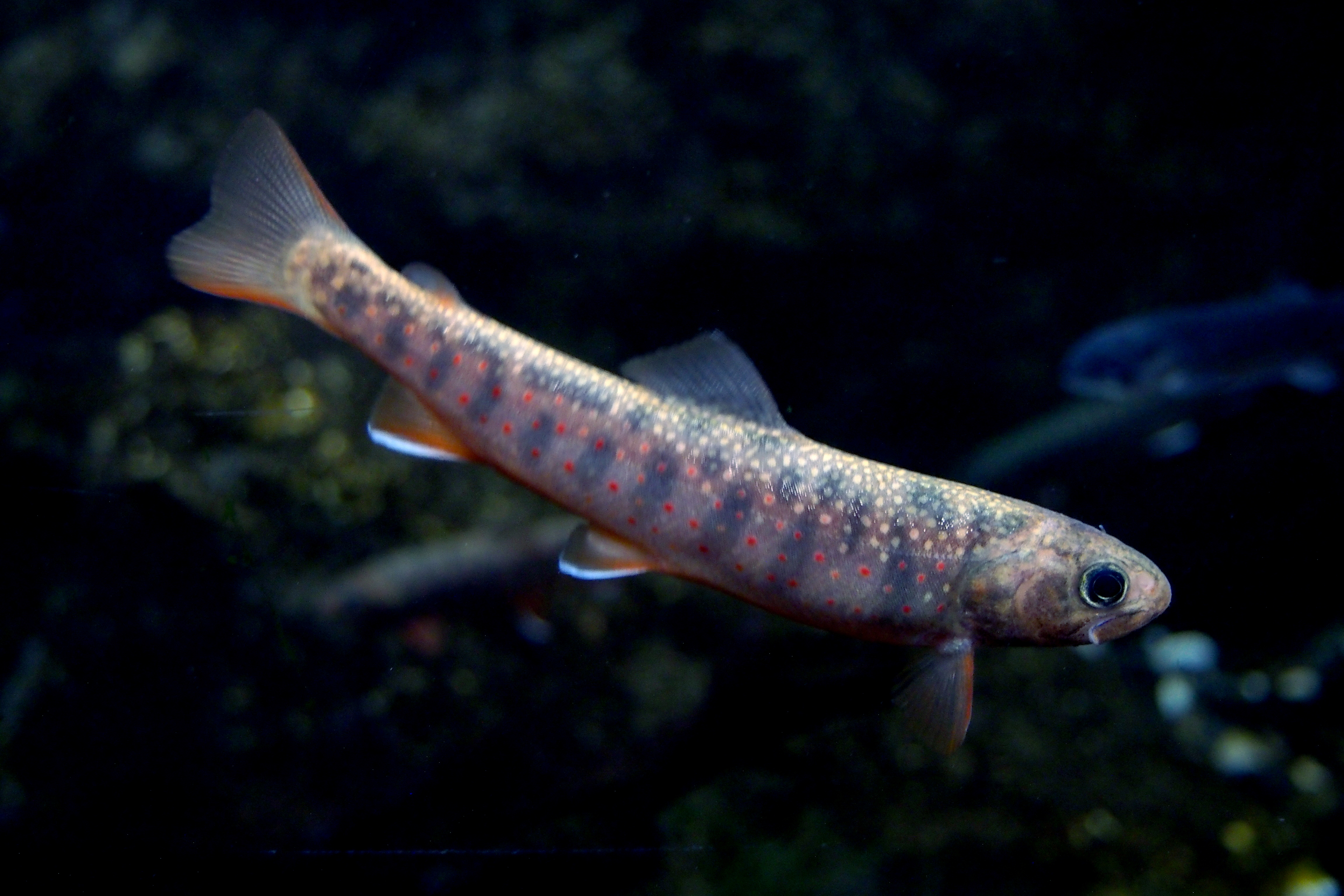 in Sunpiazza aquarium.